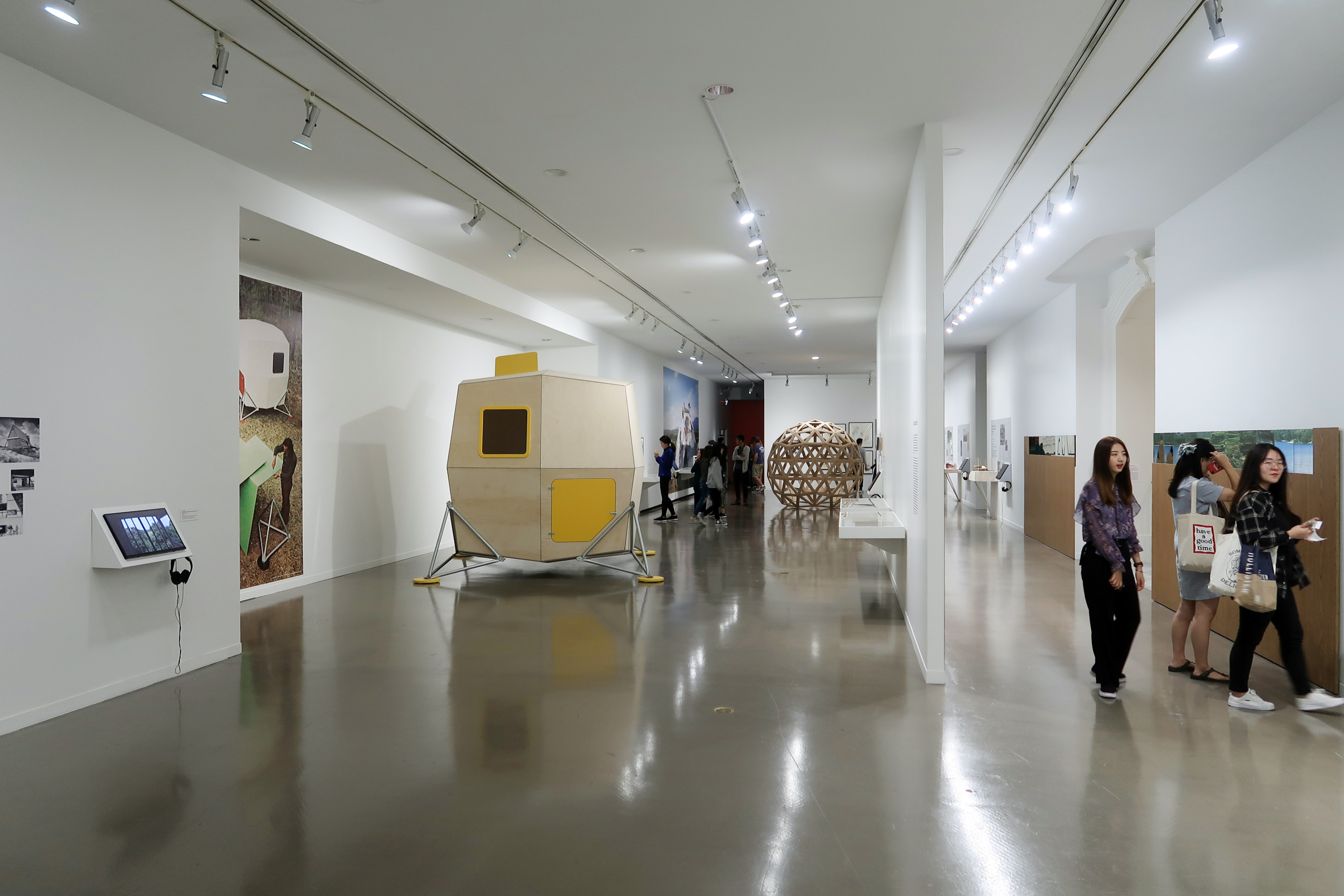 Vancouver Art Gallery Level 2